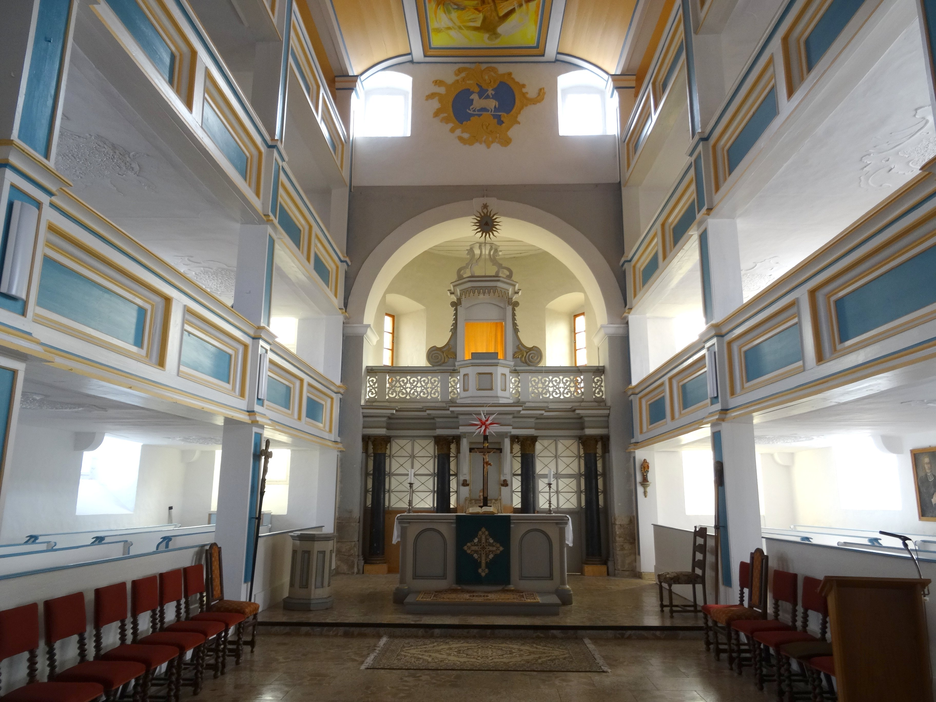 Kirche St. Crucis (Wölfis) von 1736